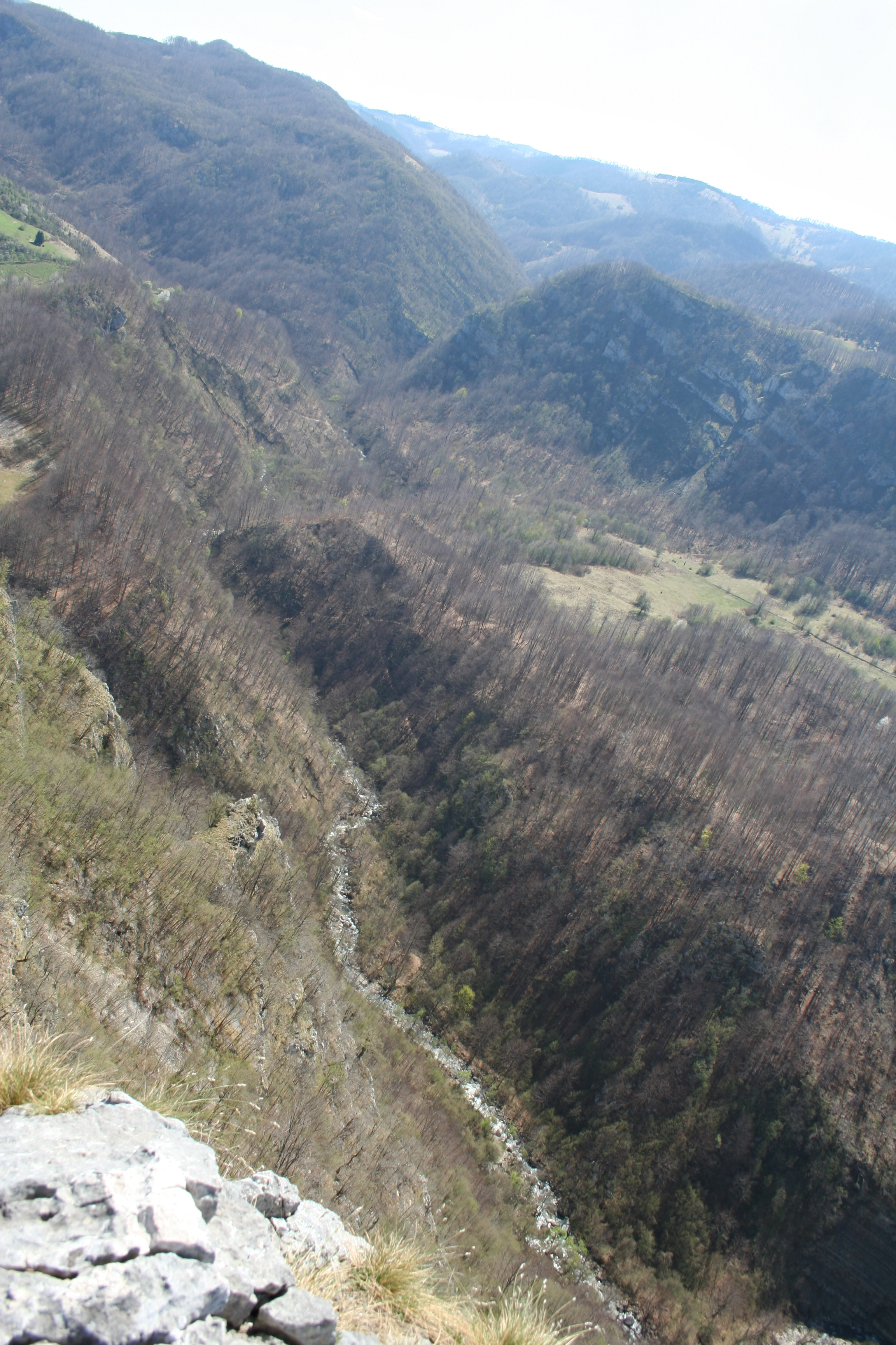 Kanjon reke Trešnjice Ово је фотографија заштићеног природног добра у Србији под шифром: РП40 This is a a photo of a natural area in Serbia with ID: РП40